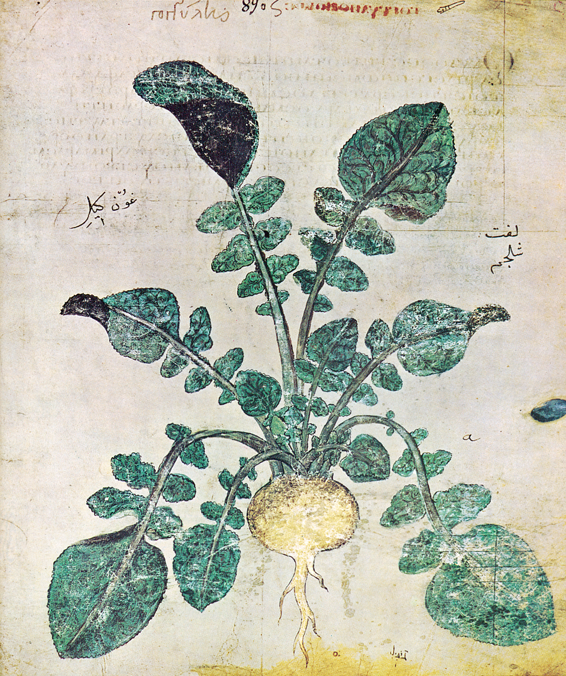 Weiße Rübe (Brassica rapa L., Fam. Cruciferae) im Wiener Dioskurides